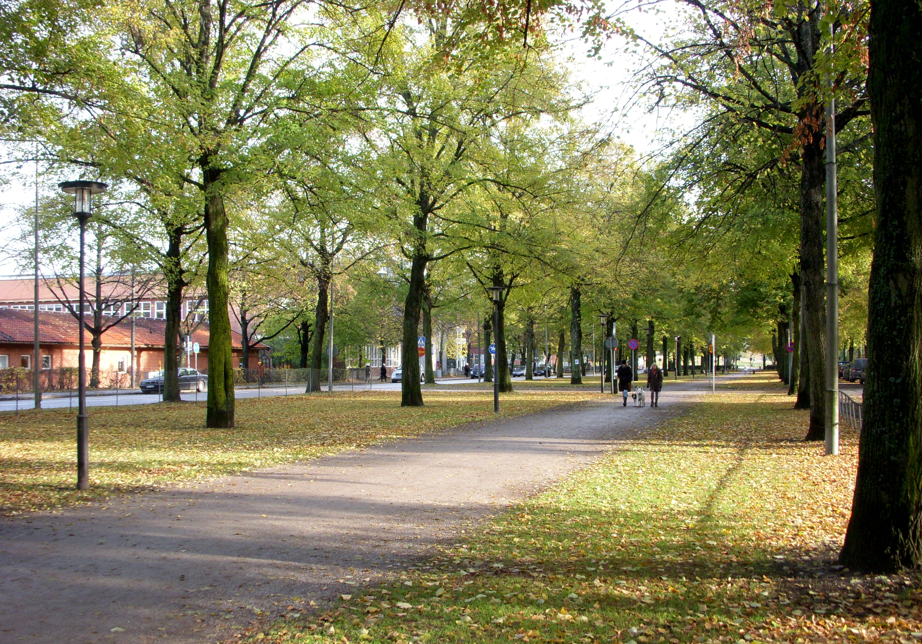 Valhallavägen, Stockholm, höst